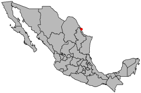 Ubicación/Location Nuevo Laredo Tamaulipas, México